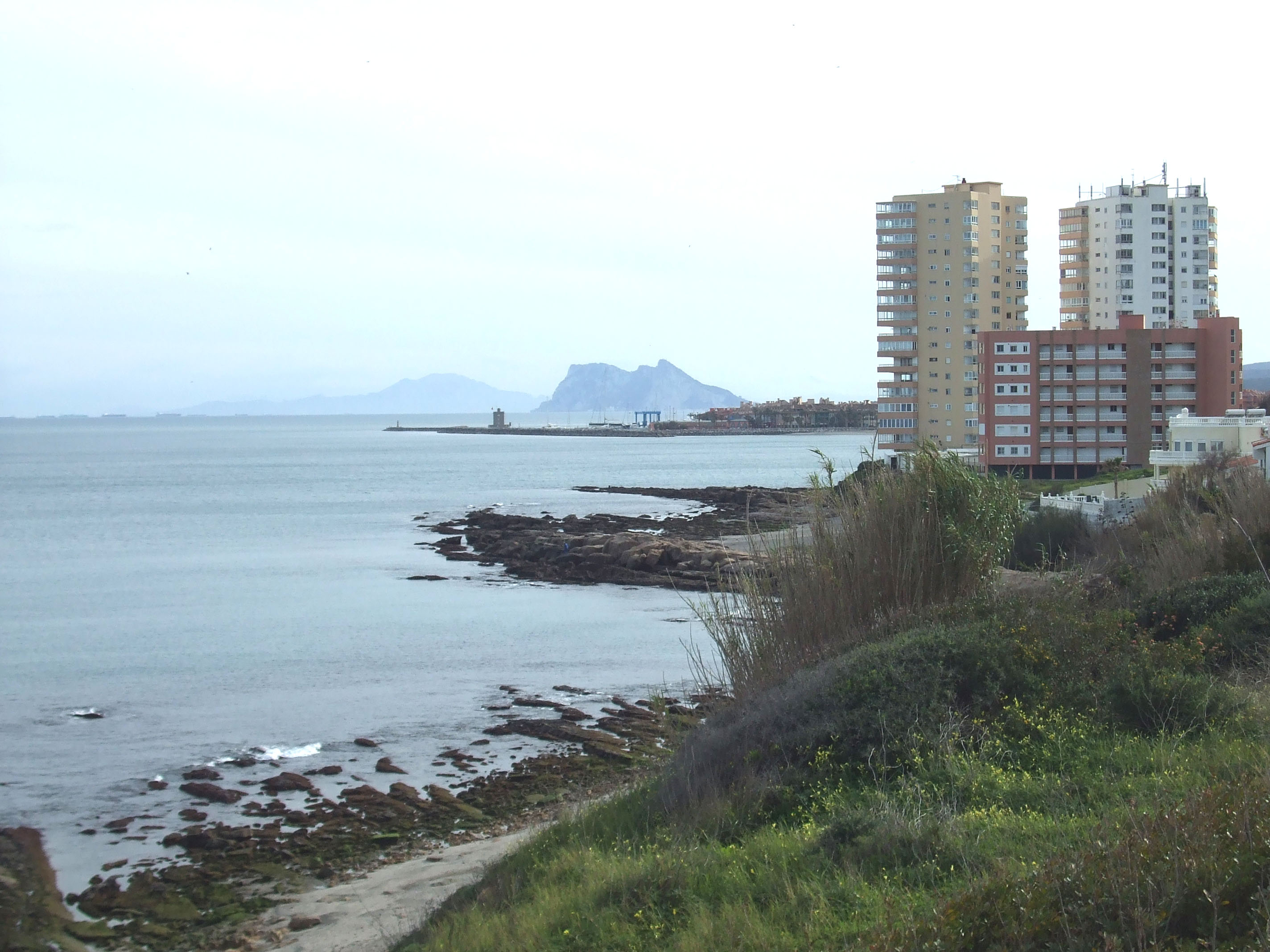 Playa y edificios de Torreguadiaro, con el Puerto de Sotogrande en segundo plano, y el Peñón de Gibraltar y el norte de África al fondo.